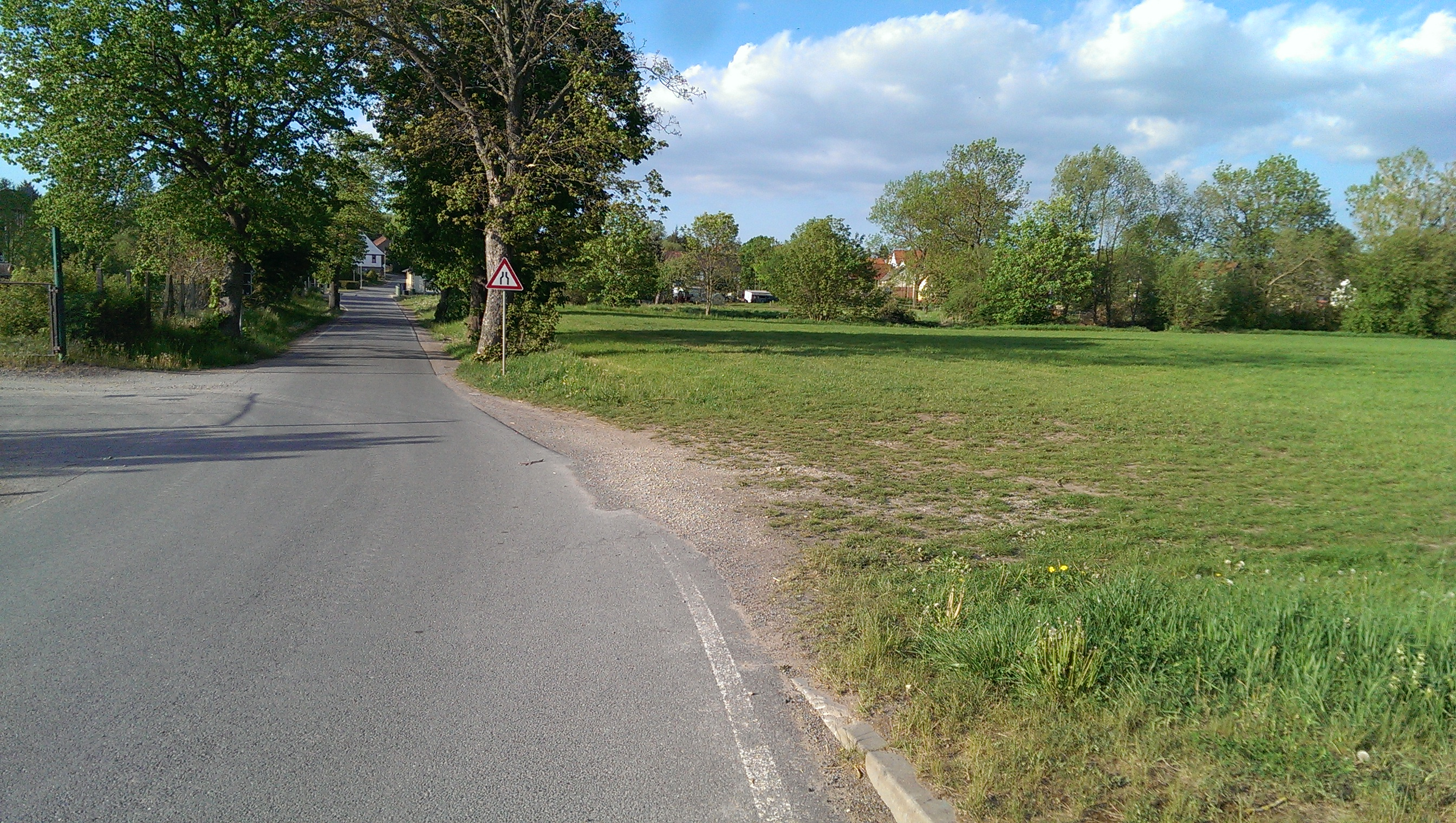 Ortseingang Wollersleben an der Wipper.